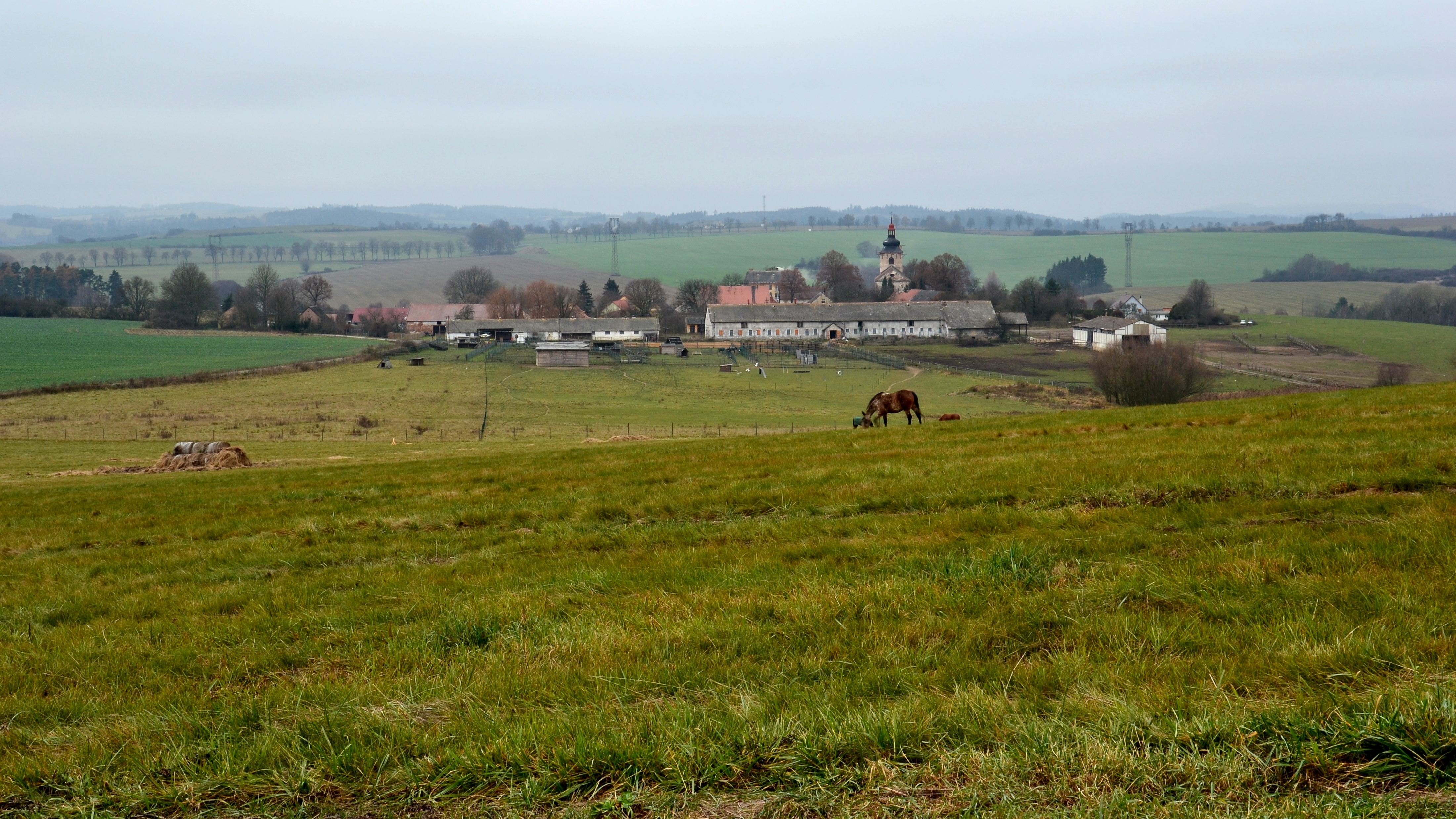 Kobylé - celkový pohled od východu